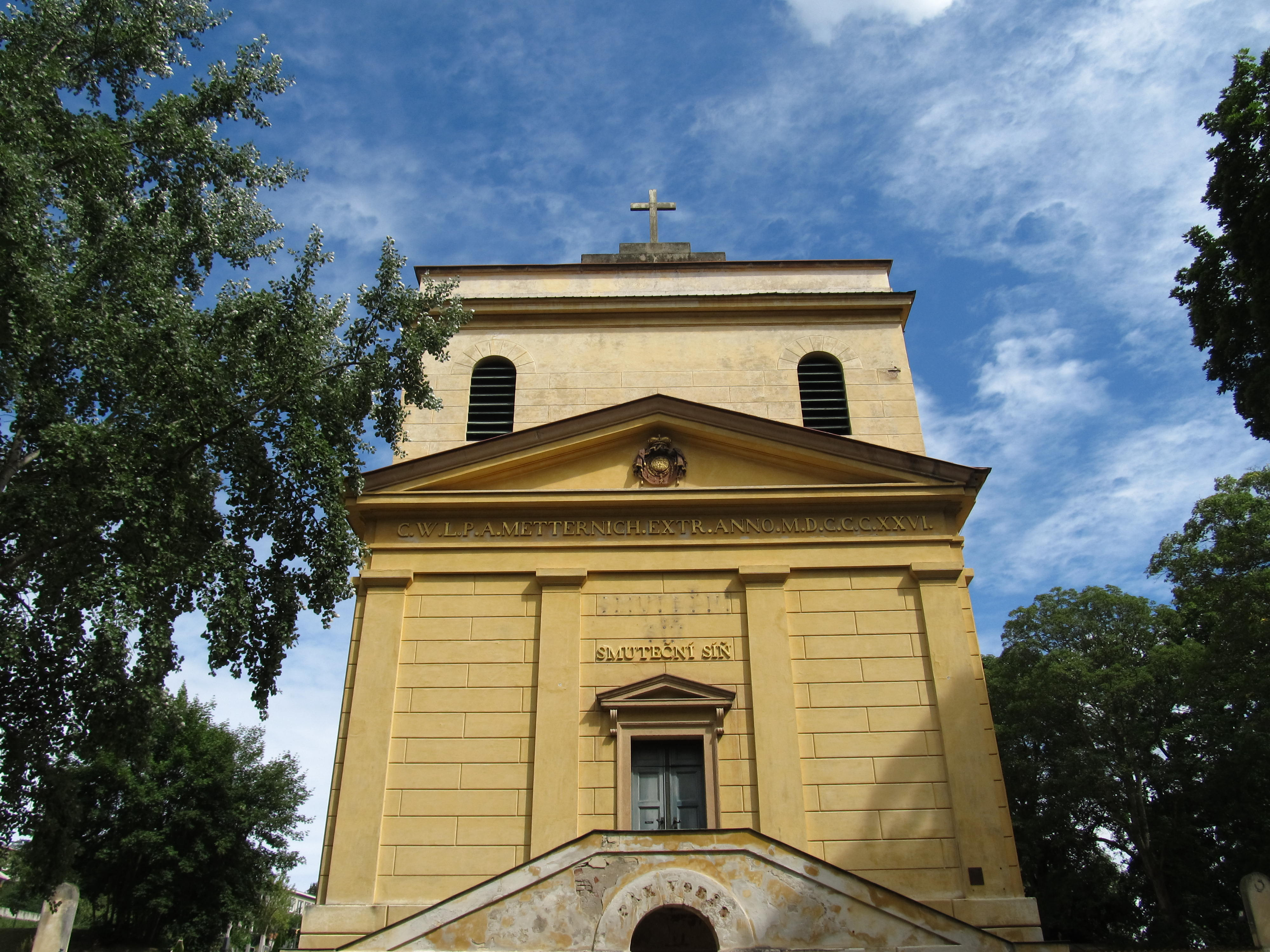 Hrobka Metternichů v Plasech